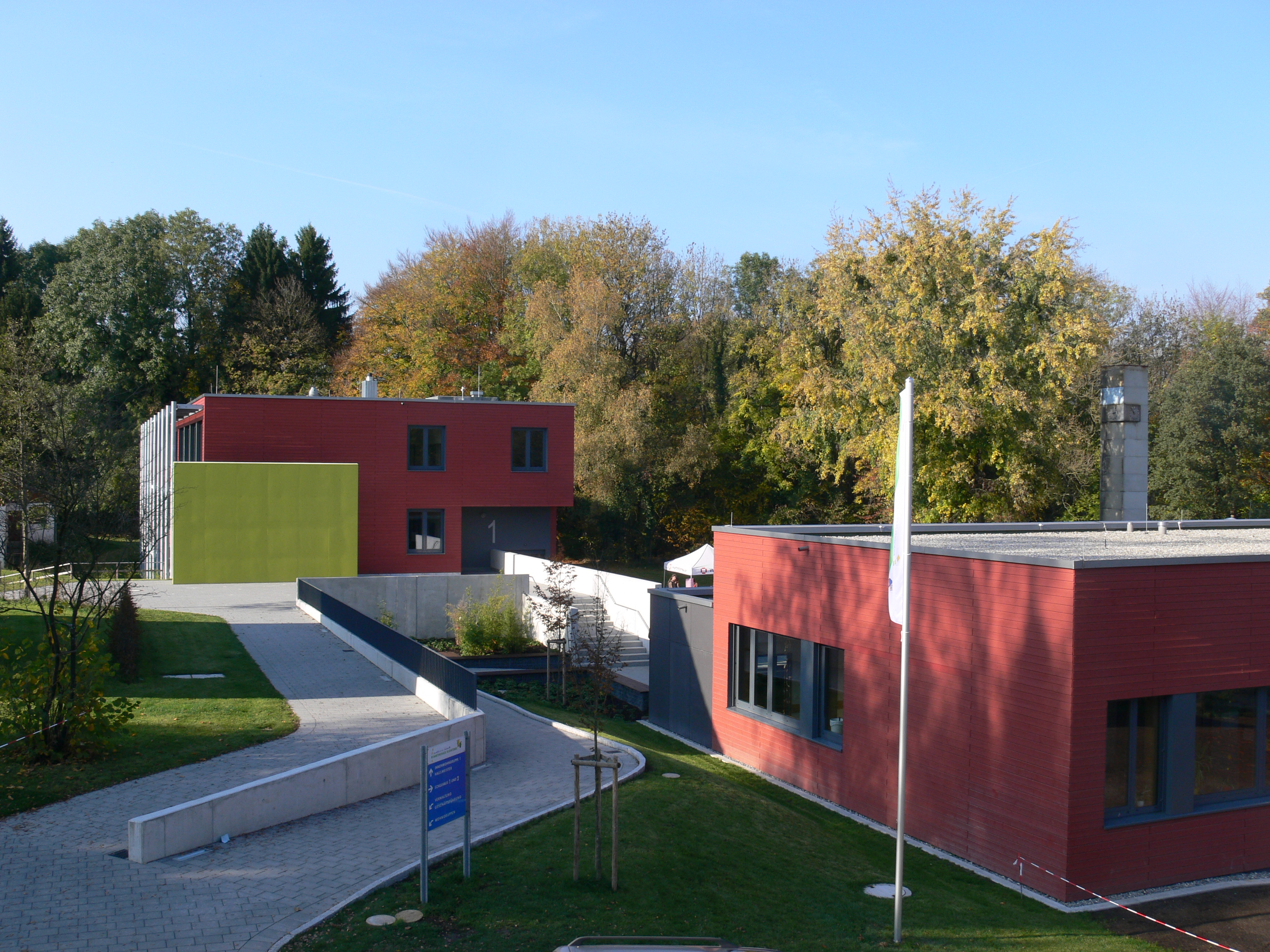 Jugendhilfeeinrichtung Martinshaus Kleintobel, 88276 Berg: Schulgebäude nach dem Um- und Neubau 2008